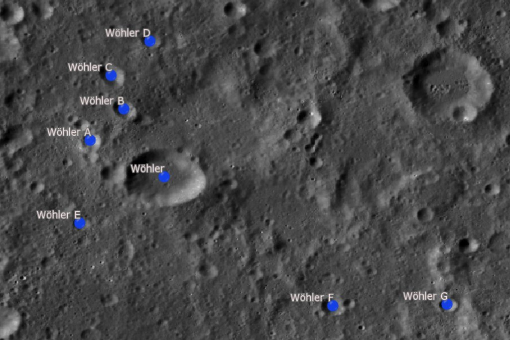 Cráter lunar Wöhler. Cráteres satélite. (Imagen LRO)